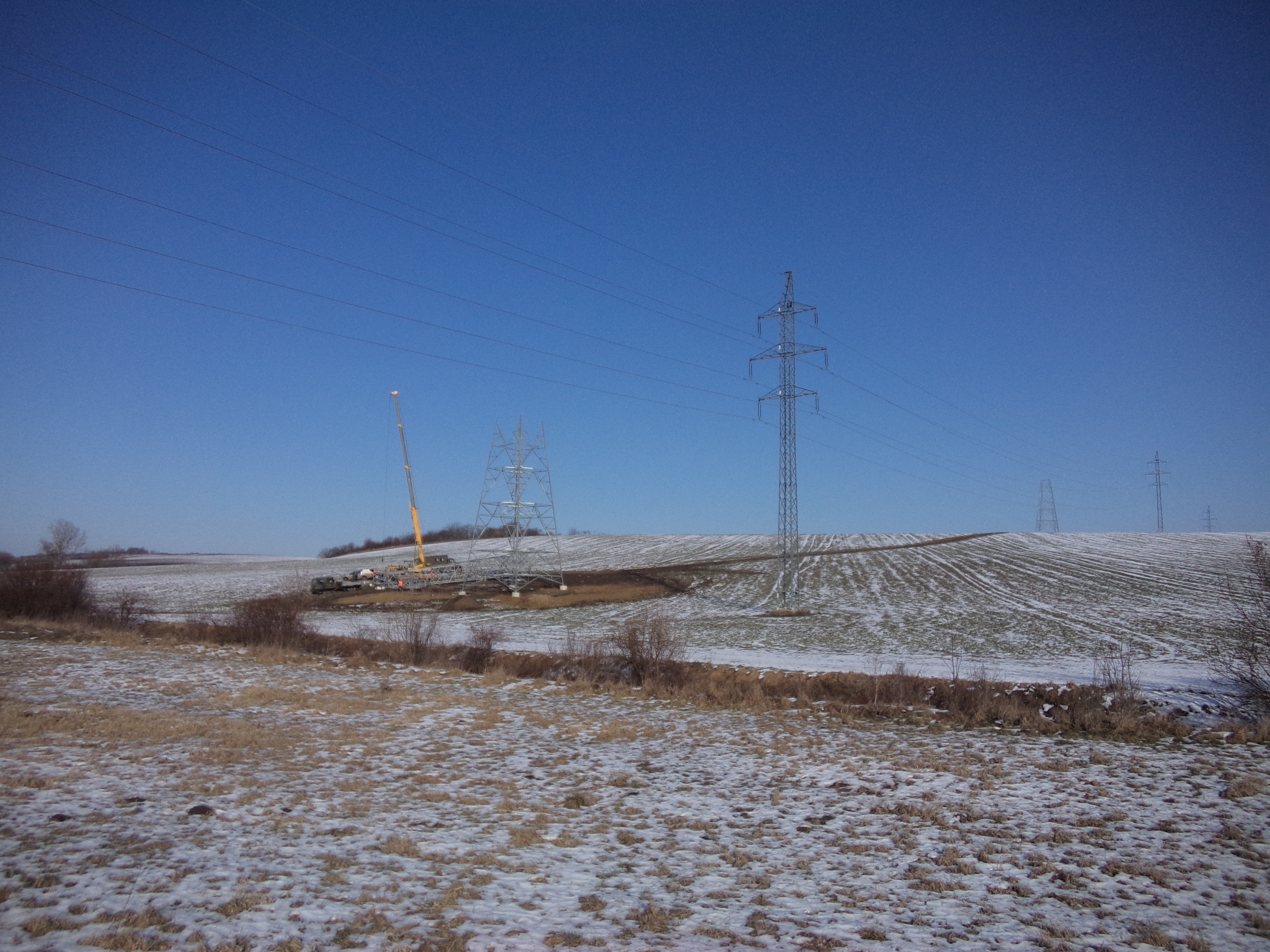 Bellegszencse